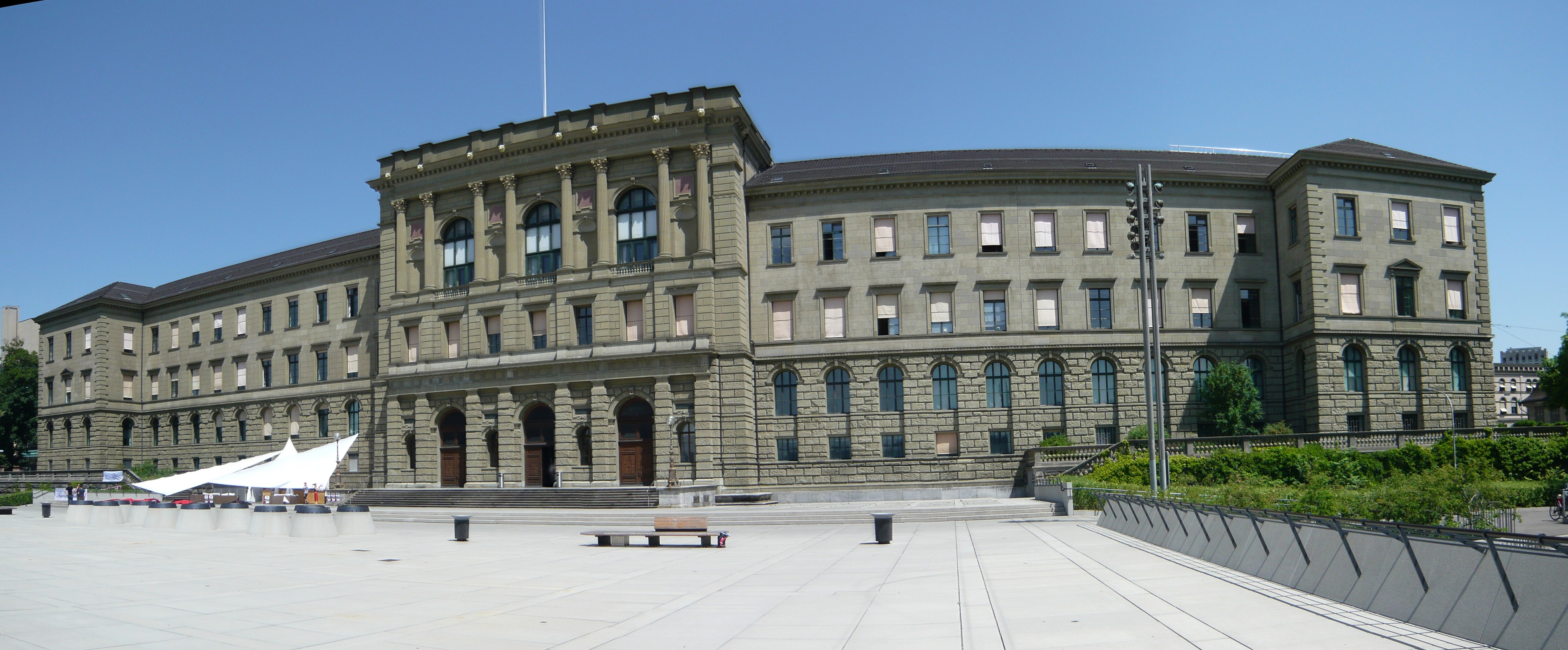 Hauptgebäude der ETH-Zürich von der Polyterasse aus